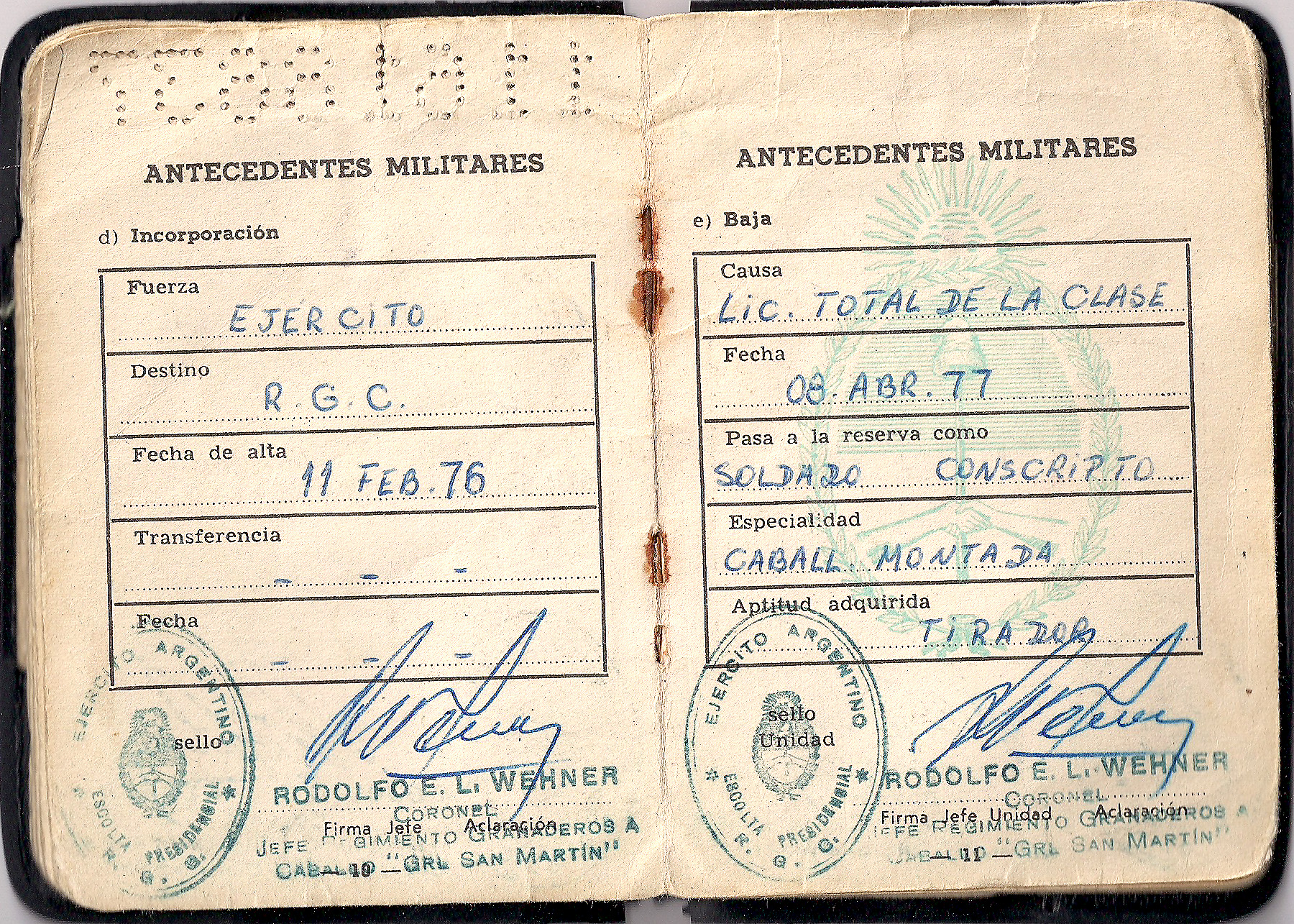 Scan DNI pg 10 a 11 de mi servicio militar obligatorio